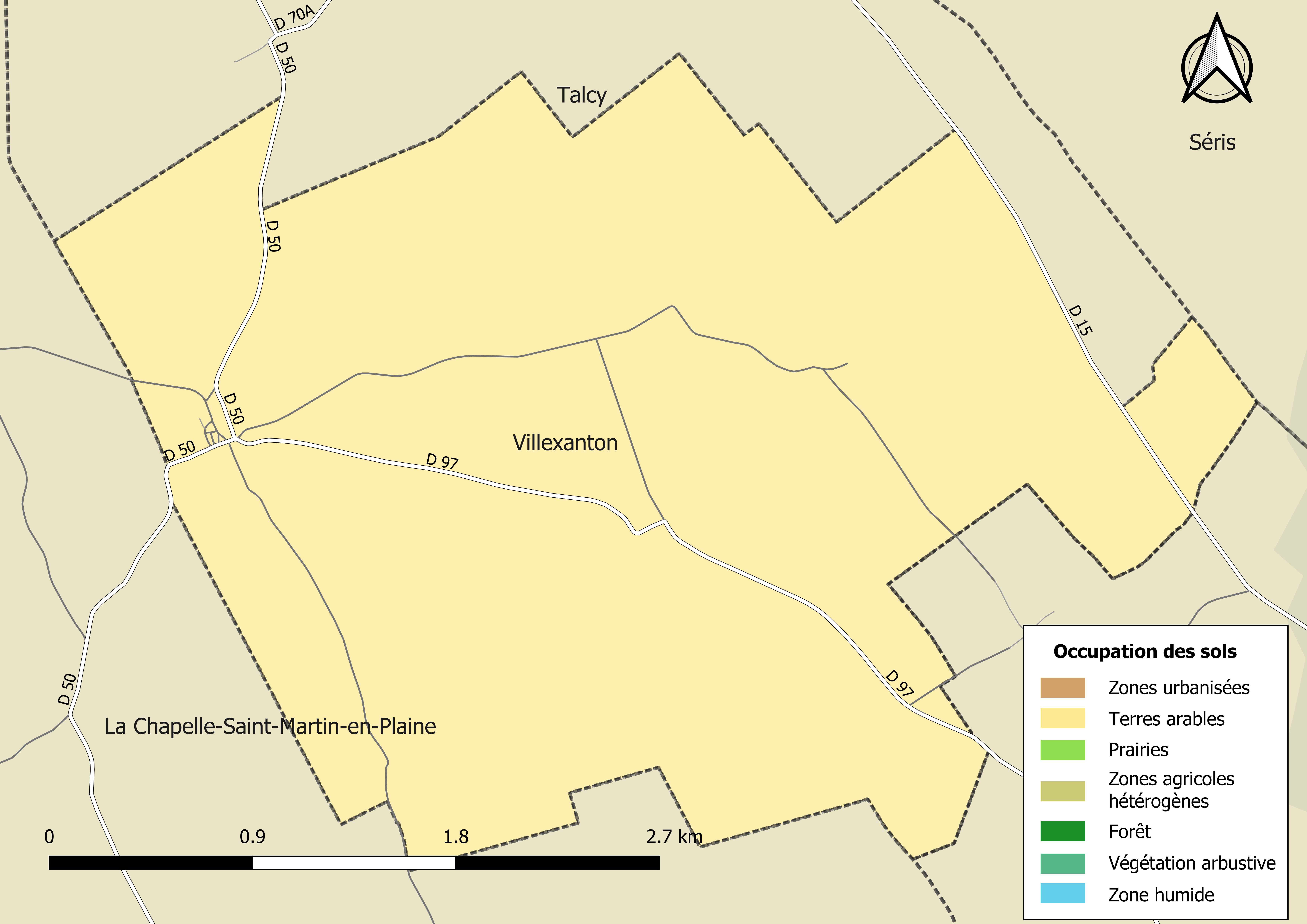 Carte des infrastructures et de l’occupation des sols en 2018 de la commune de Villexanton (France).